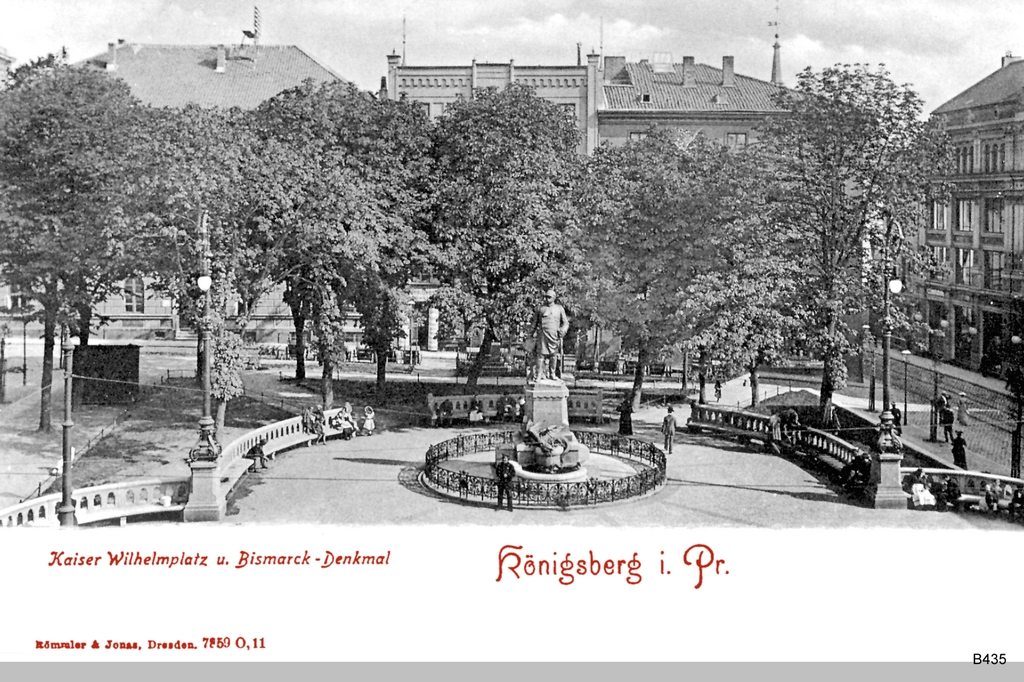 Königsberg